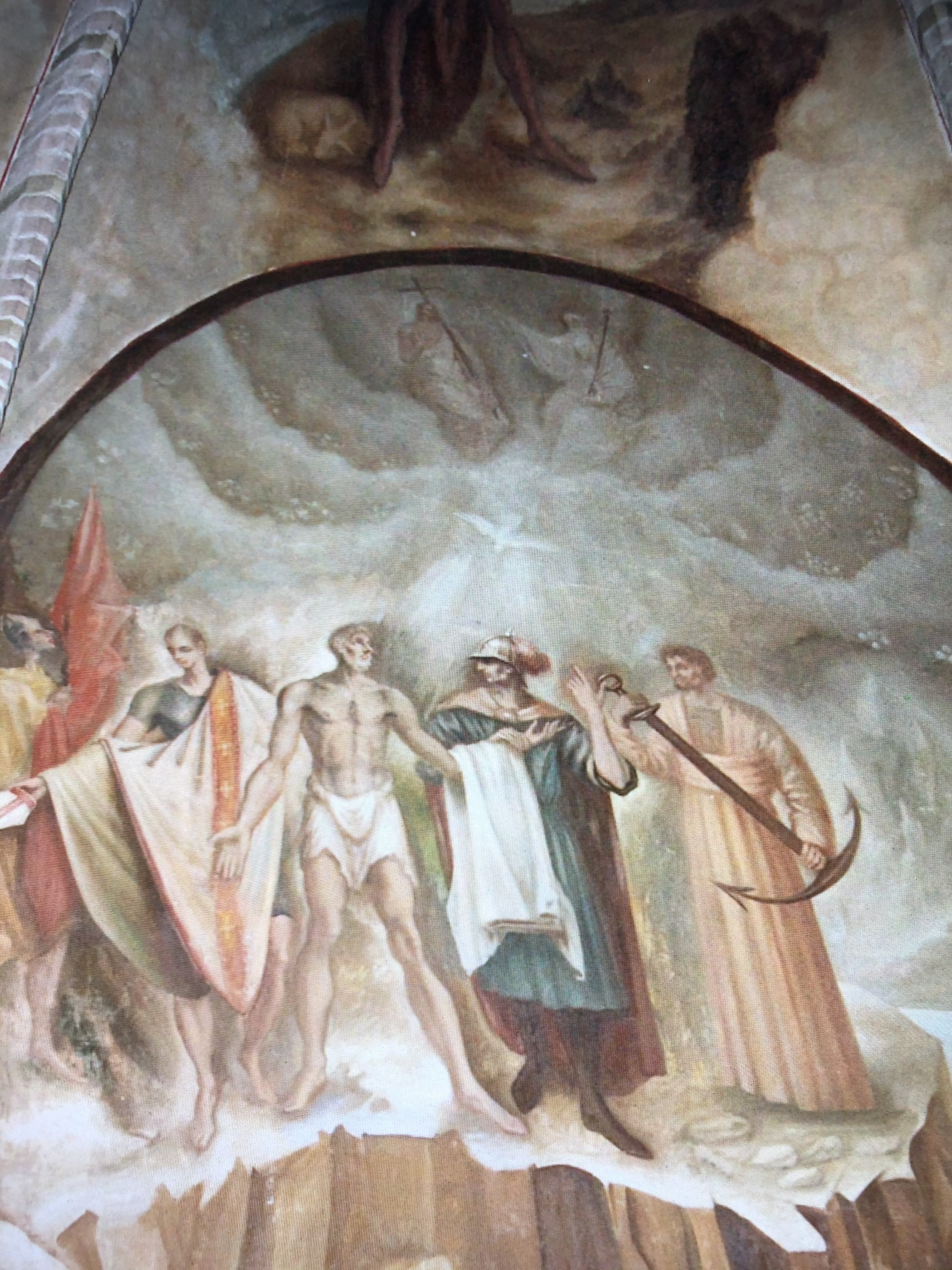 foto van de zijwand van het koor in de kerk van Nes